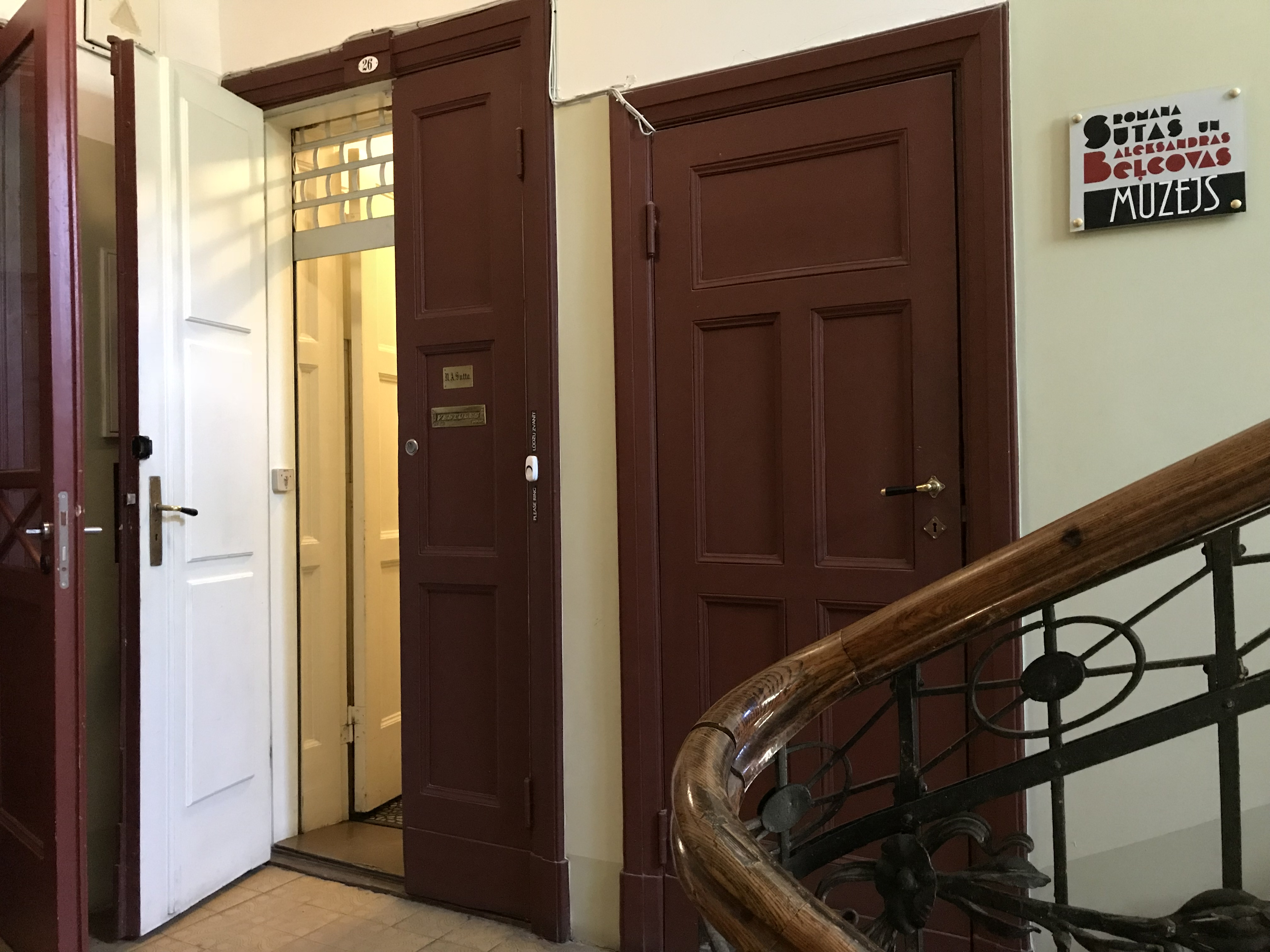 Elizabetes iela 57a i Riga, gatuhuset. Entrén till lägenhet nummer 26, som härbergerar Romans Sutas och Aleksandra Beļcovas museum.